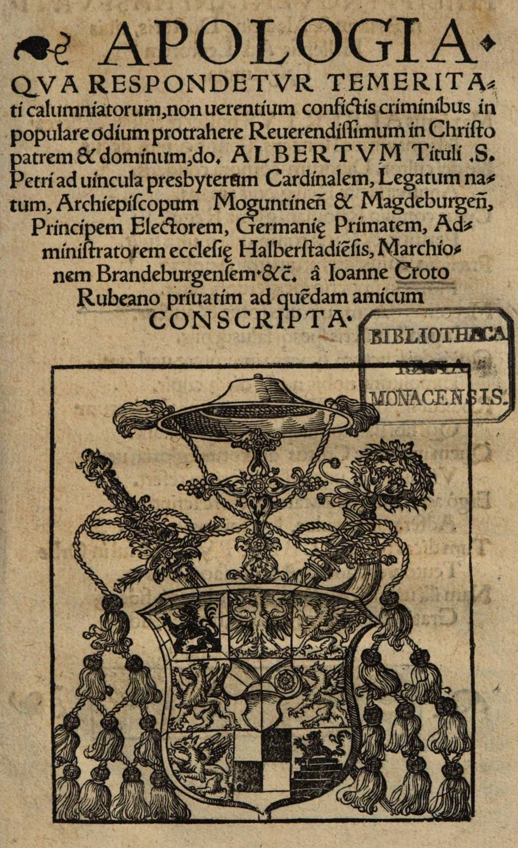 Johannes Crotus Rubeanus: Apologia qua respondetur temeritati calumniatorum für Albrecht von Mainz und Magdeburg, Leipzig 1531, Titelseite